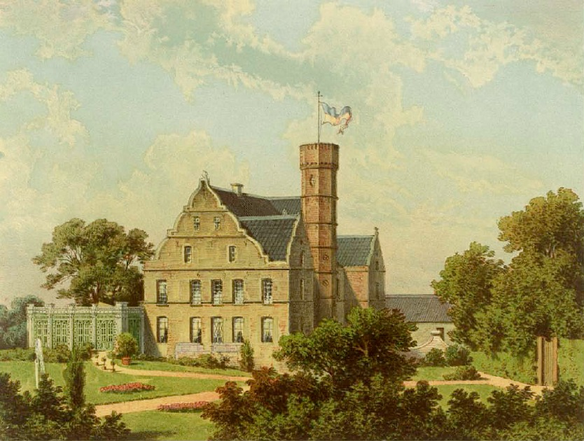 Haus Mehrum in Voerde, Kreis Duisburg, Rhein-Provinz Lithografie aus dem 19. Jahrhundert